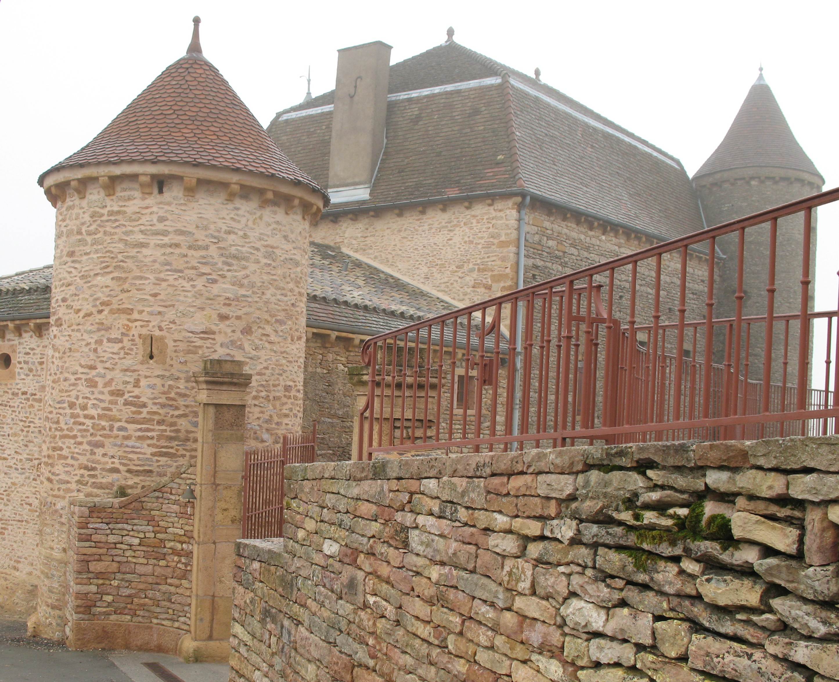 château de Pouilly - Fuissé (Saône-et-Loire)